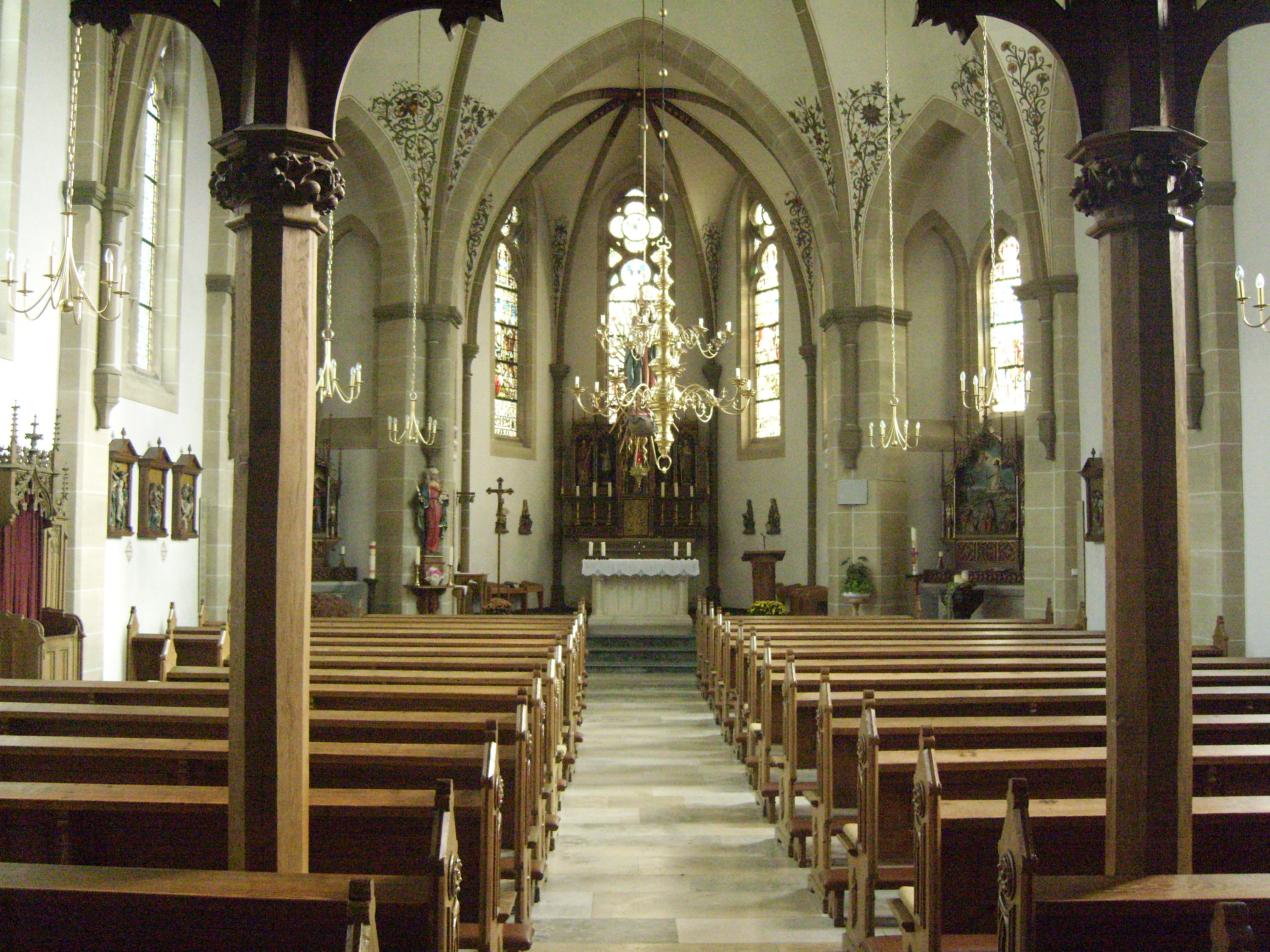 Pfarrkirche-St.-Johannes-Baptist, Blick durch das Kirchenschiff auf den Altar, Medebach-Düdinghausen This image shows a heritage building in Germany, located in the North Rhine-Westphalian city Medebach (no. 42).